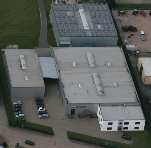 die Deutschland-Zentrale der El Puente GmbH